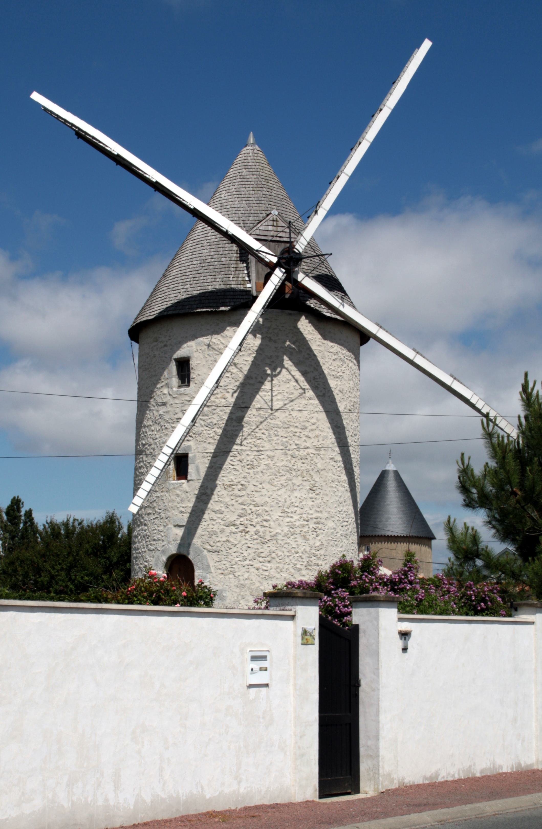 Photo du moulin de la Plataine sise à 17560 Bourcefranc le Chapus